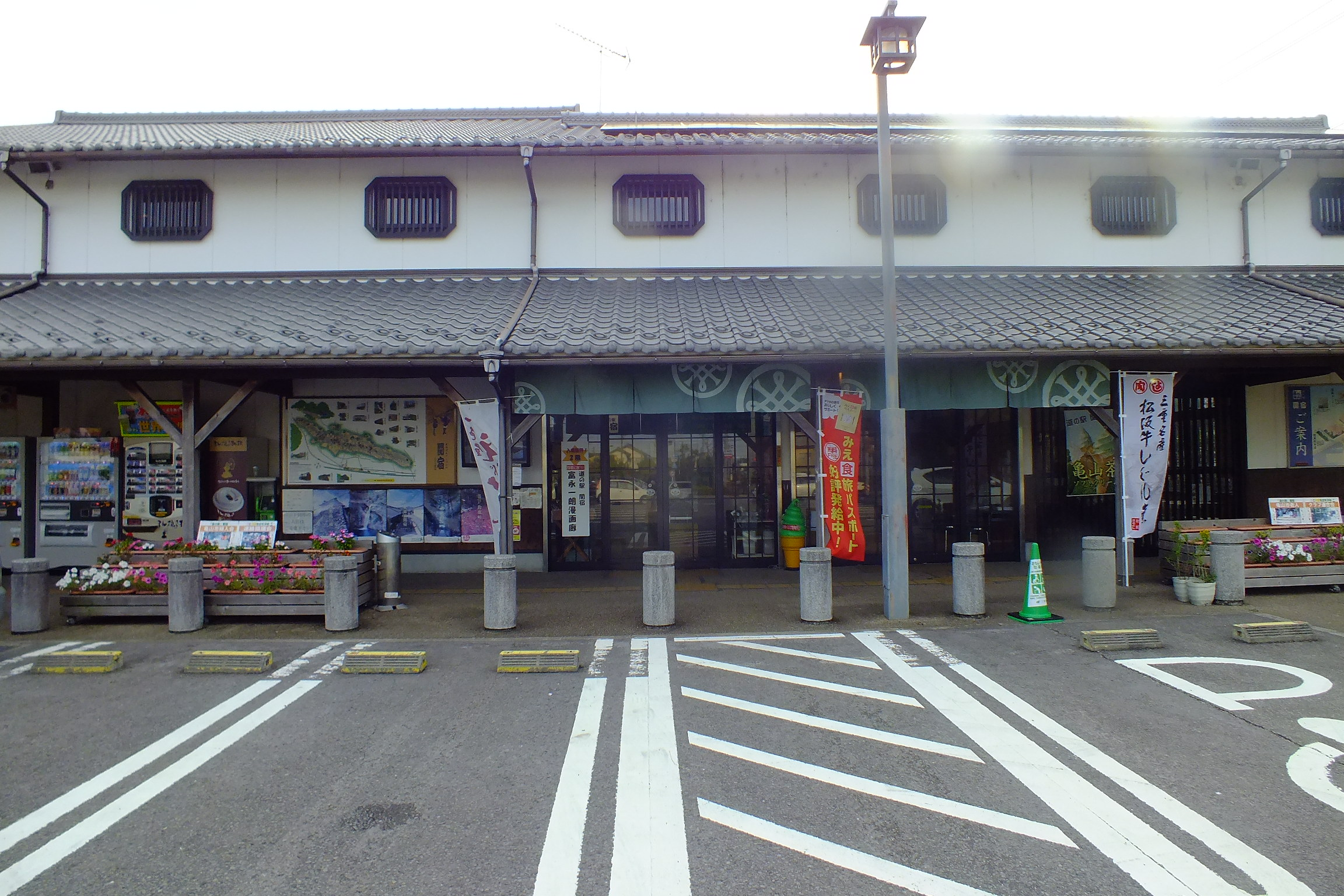 Tokaido Seki Juku Kameyama City Mie,東海道五十三次 道の駅関宿